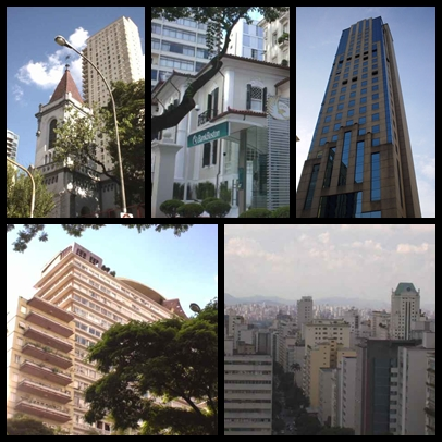 Montagem de fotos da Zona Noroeste, São Paulo, Brasil